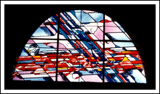 Lavérune (Hérault) - Vitrail de l'église par Carlo Roccella (Carlo Roccella)